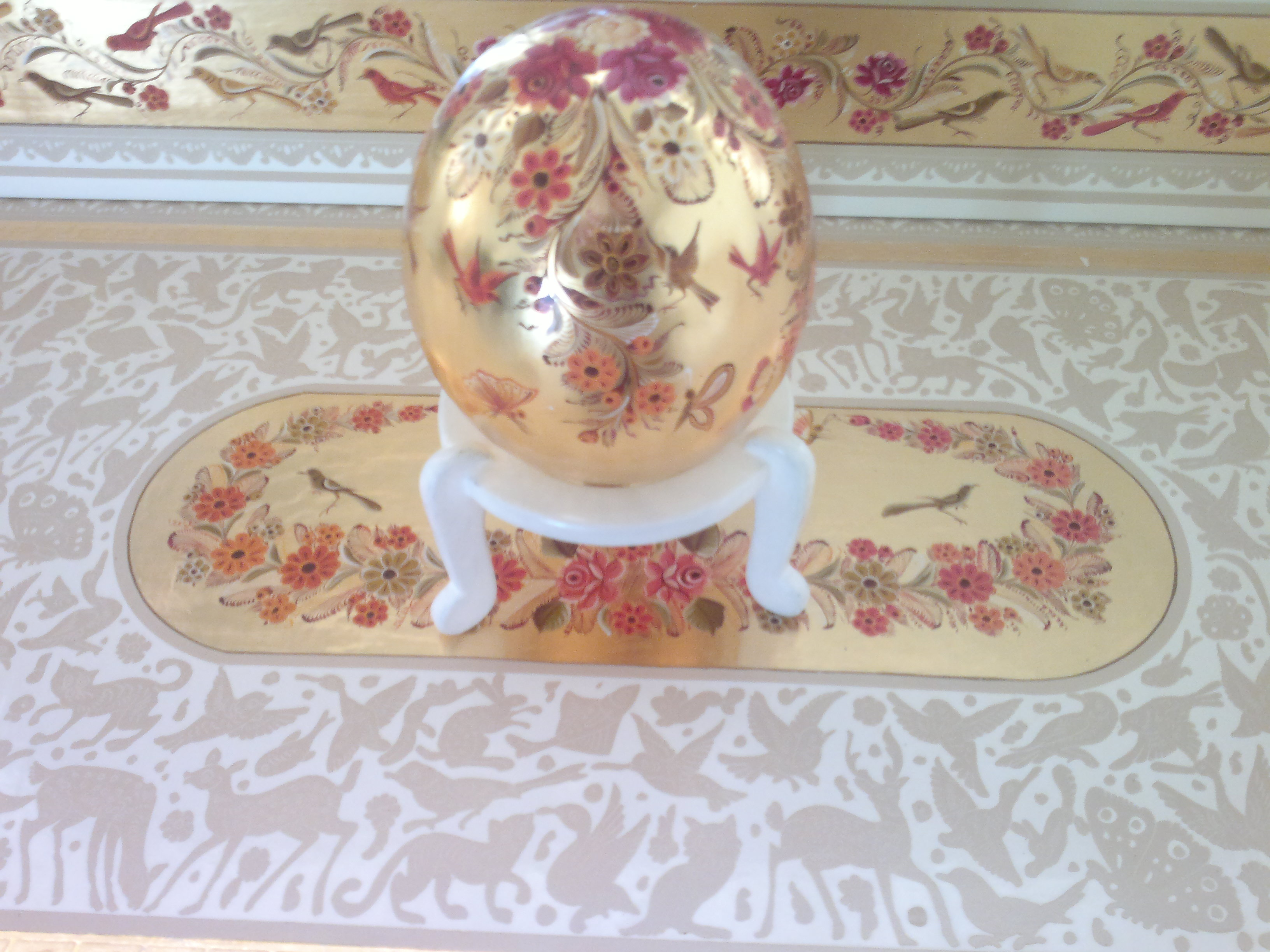 Fotografía de un bule, tecomate o pumpo, legenaria luncantanh, perteneciente al acervo del ICAT en olinalá Guerrero. Pieza decorada al estilo dorado, tradicional de la región de Olinalá y Temalacatzingo, en la montaña de Guerrero. Se puede encontrar más información de esta técnica de decoración en